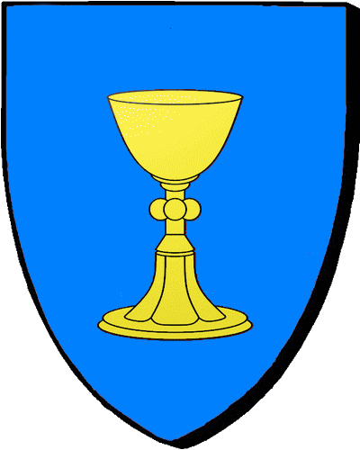 En glazur, e c'halier en aour